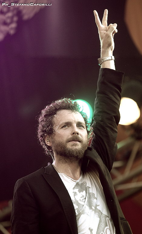 Lorenzo Jovanotti Cherubini live all' Mtv Day 2007 - Milano